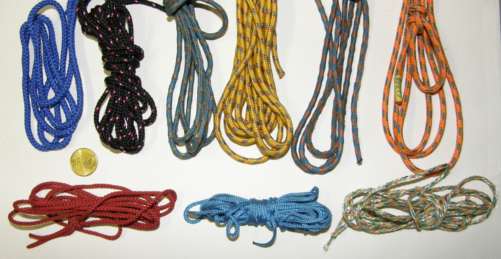 Reepschnuere